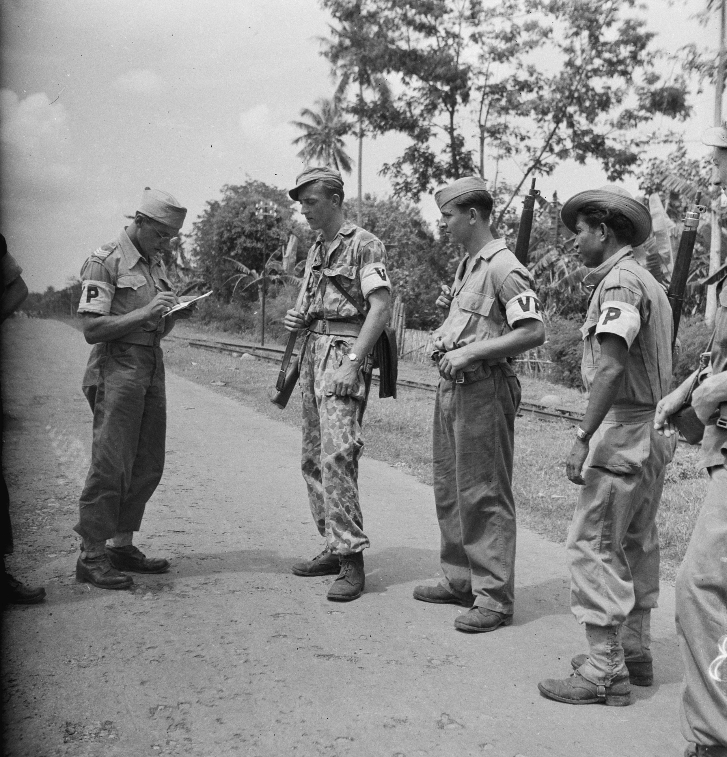 Collectie / Archief : Fotocollectie Dienst voor Legercontacten Indonesië Reportage / Serie : [DLC] Trowoelan nabij Modjokerto status-quo lijn Beschrijving : [vier Nederlandse militairen met armbanden ´VP´ Een sergeant, met dezelfde armband, noteert iets. Op de achtergrond een spoorlijn] Datum : 12 februari 1948 Locatie : Indonesië, Nederlands-Indië Fotograaf : Fotograaf Onbekend / DLC Auteursrechthebbende : Nationaal Archief Materiaalsoort : Negatief (zwart/wit) Nummer archiefinventaris : bekijk toegang 2.24.04.03 Bestanddeelnummer : 12934